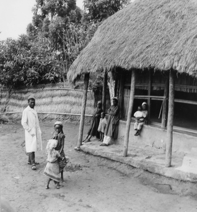 De foto is genomen in het Bamenda district in Kameroen.